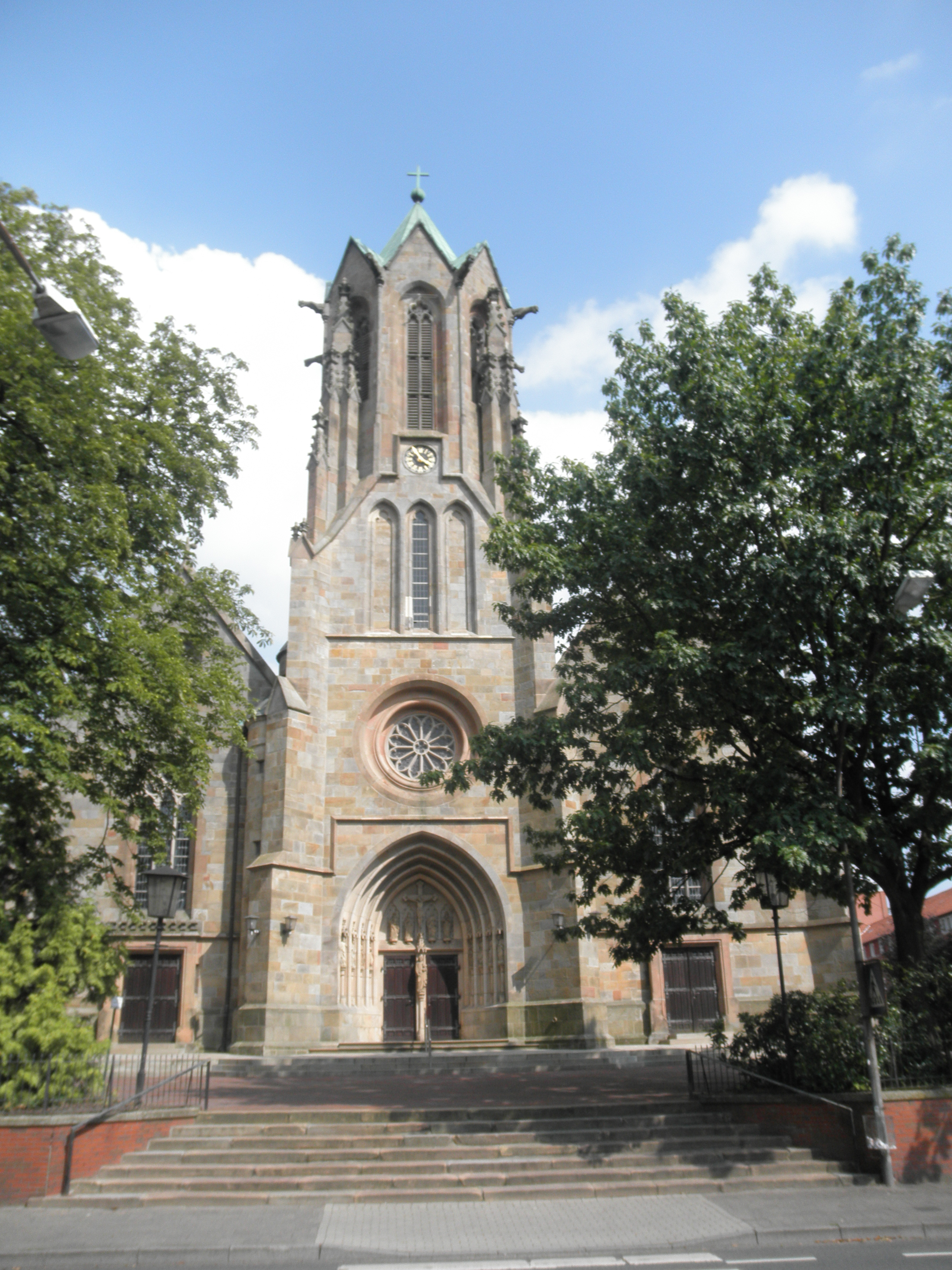 Preĝejo St. Vitus en Meppen